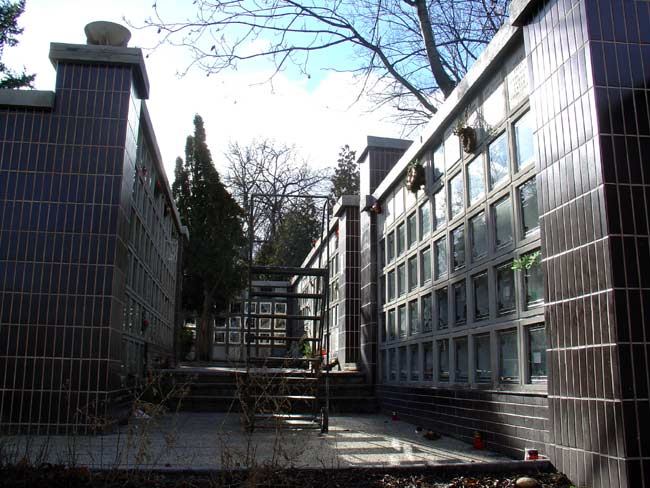 Kolumbárium Vzájemně podpůrného spolku Svépomoc v Praze Holešovicích.